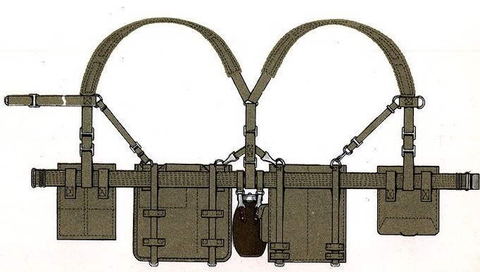 Oporządzenie osobiste żołnierza (pasoszelki) lwp/wp. Rozmieszczenie elementów wg. regulaminu